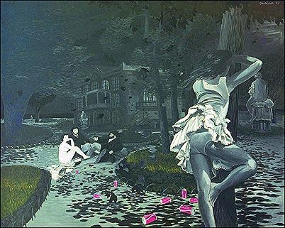 peinture de jean Jacques Surian